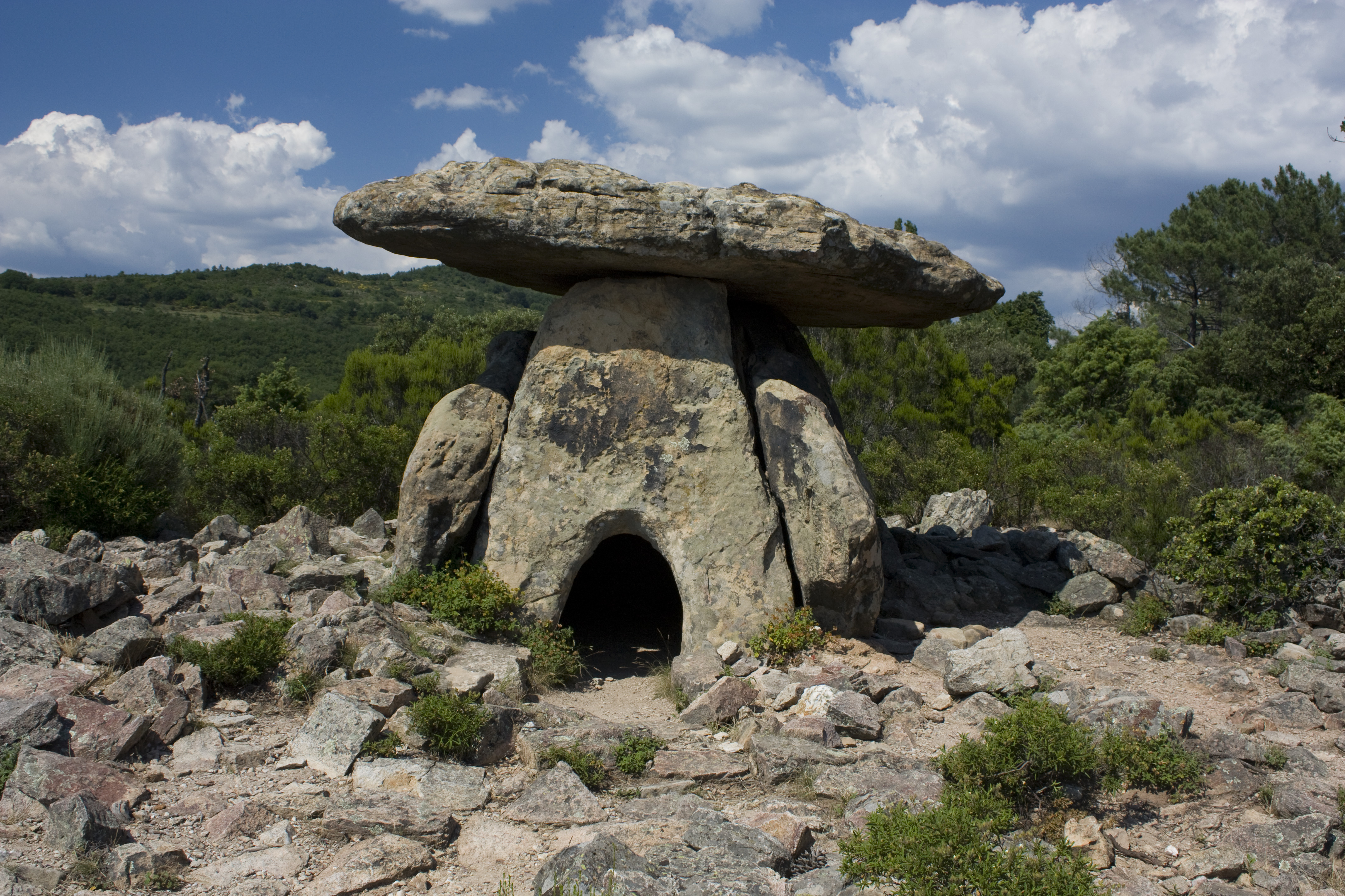 Le Dolmen de Coste-Rouge, vu de l'ouest à 4 m de la terrasse circulaire.